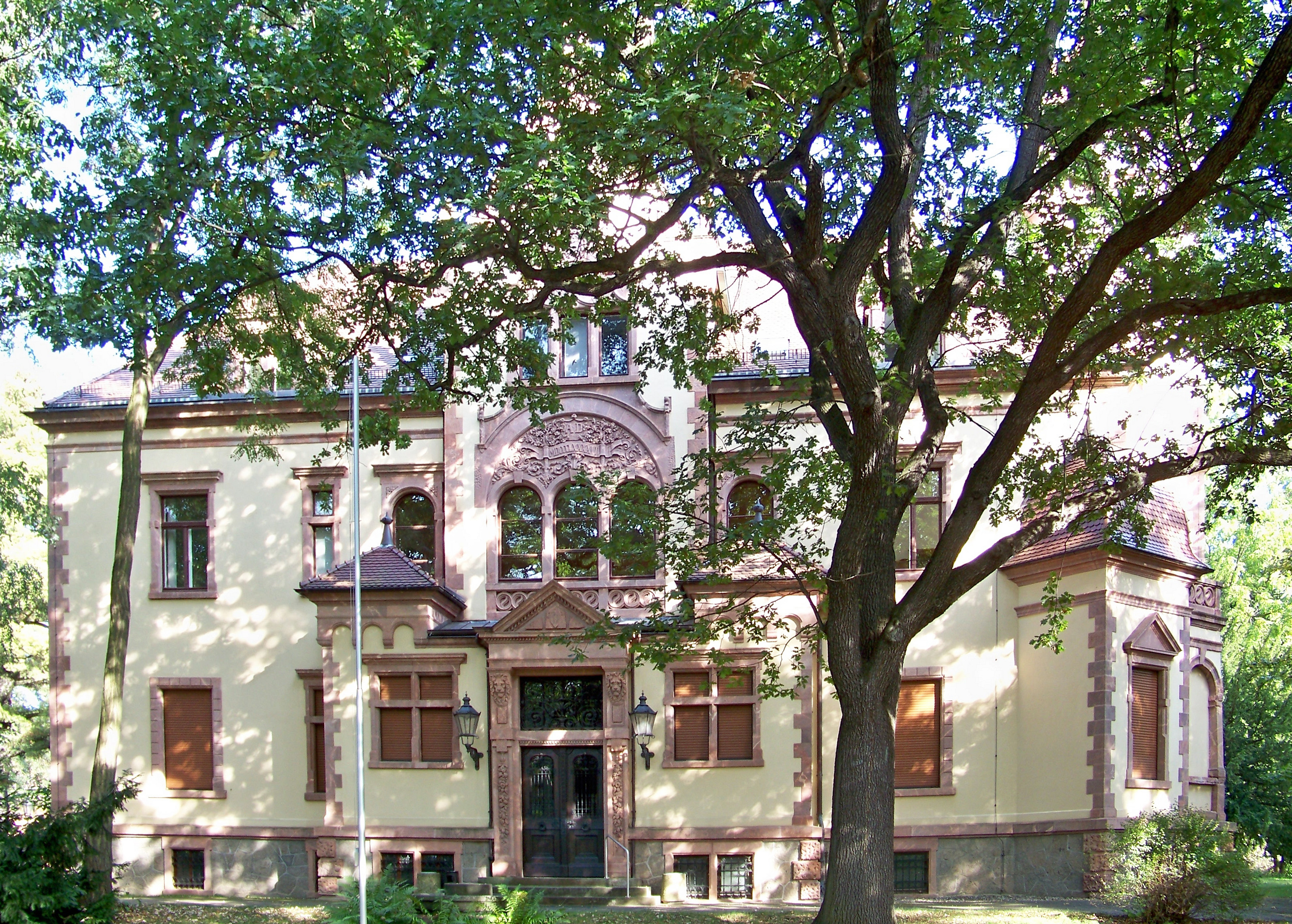 Verwaltungsgericht Leipzig in der Rathenaustraße 40 in Leipzig-Leutzsch